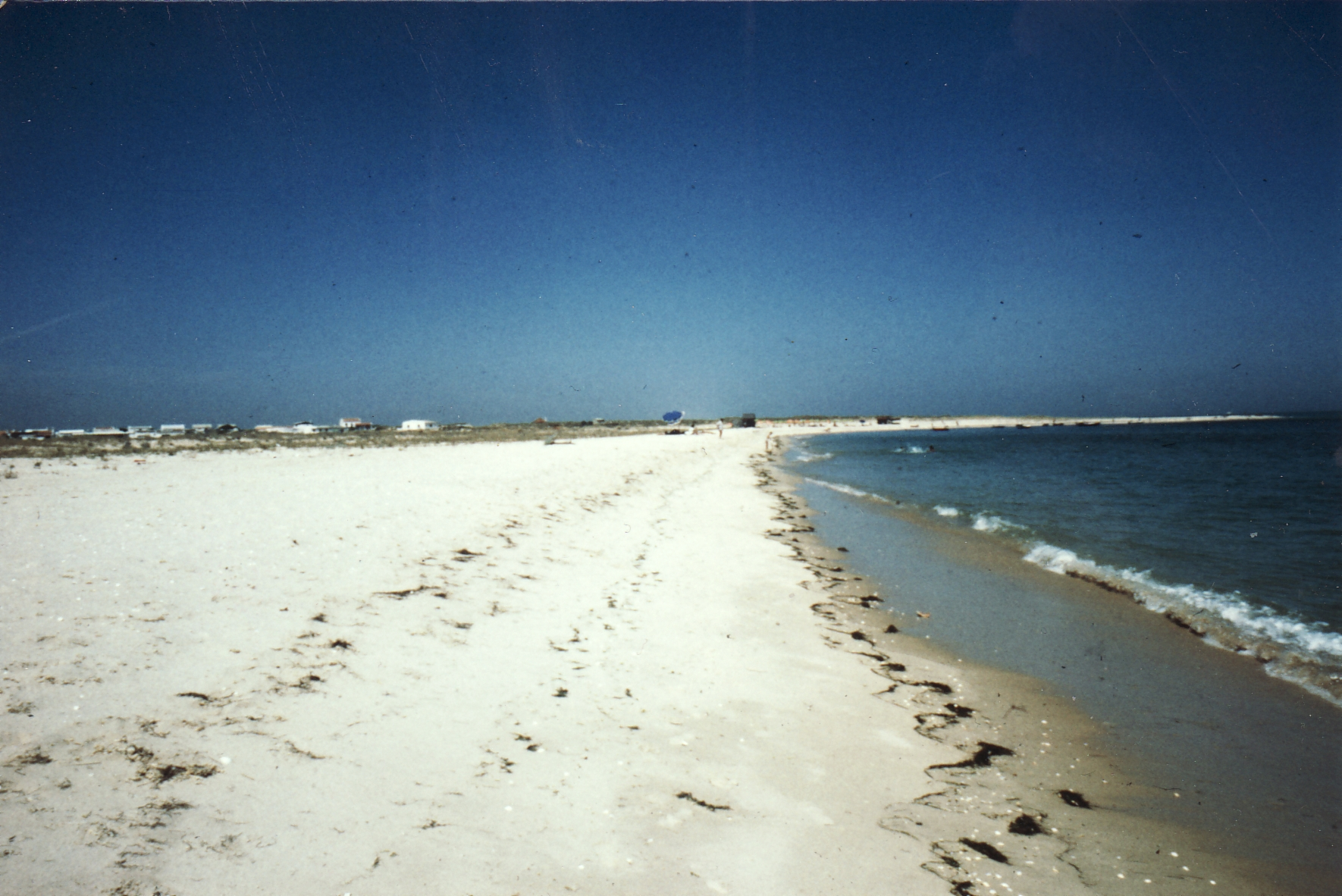 Portugal - Algarve: Ilha da Armona vor Olhão, Strand